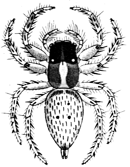 Artabrus planipudens = Plexippus paykulli